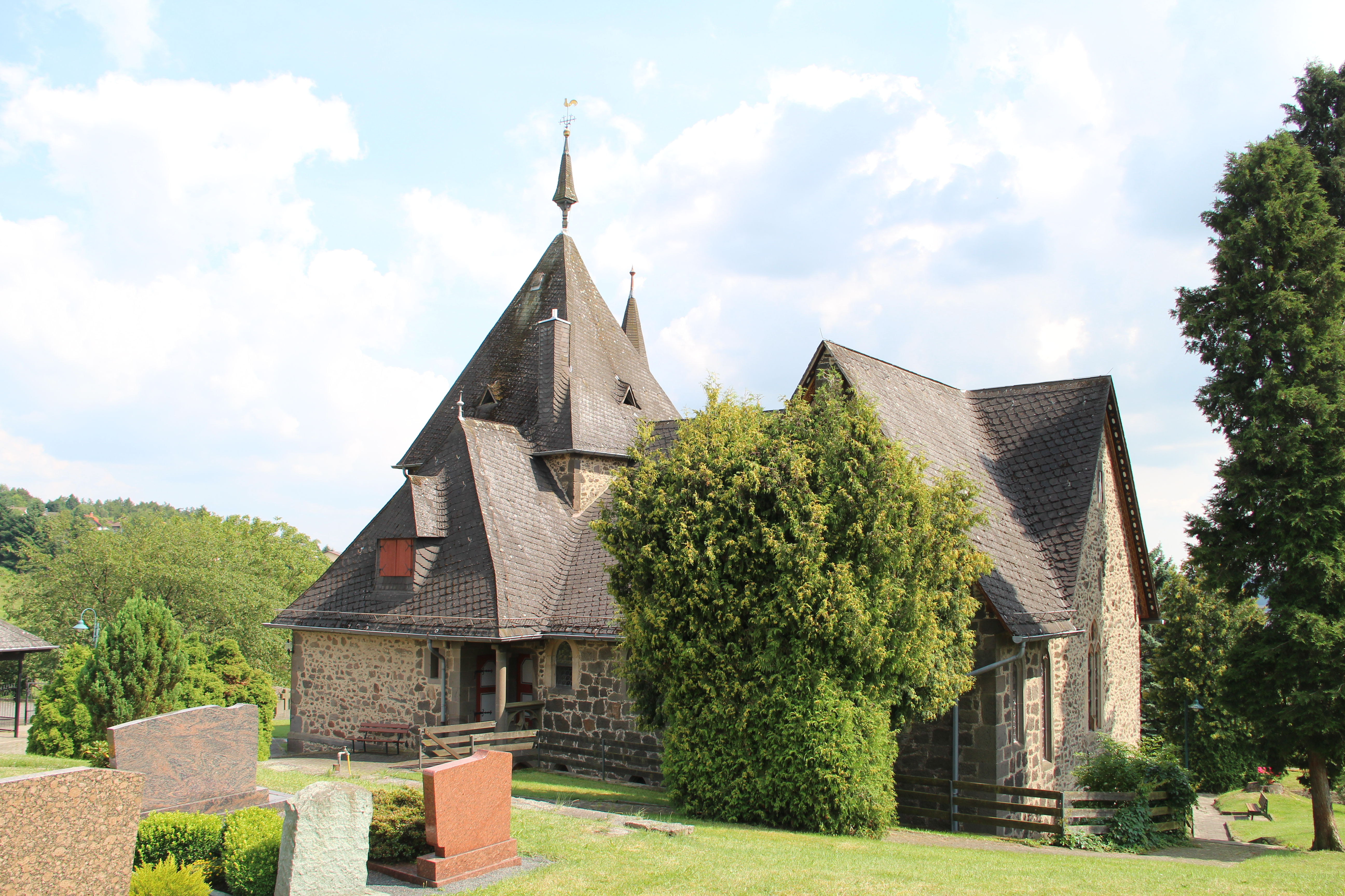 Evangelische Kirche Winnen (Allendorf/Lumda)